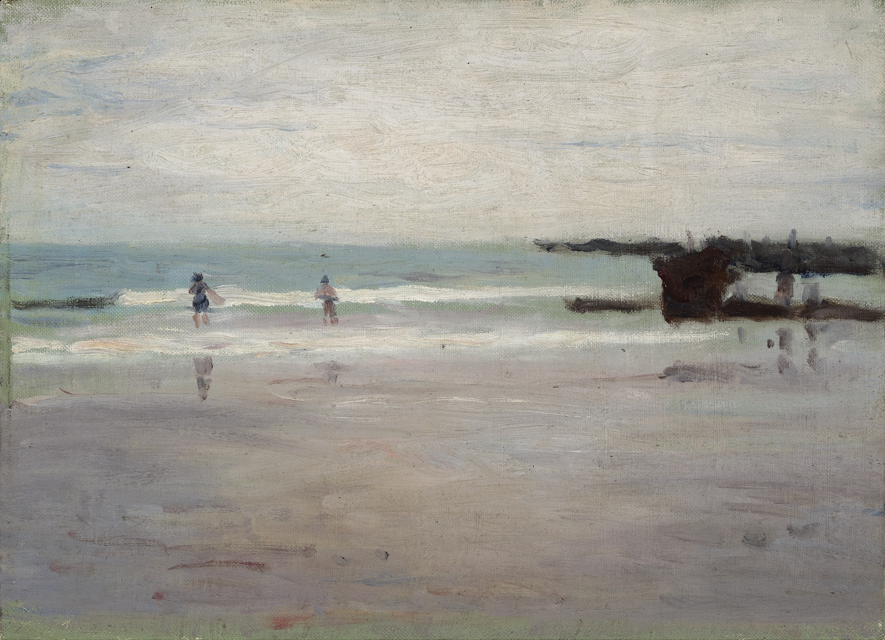 中文（台灣）: 李梅樹作品：海邊，年代不詳，油彩，木板。北部海邊僅畫出海天地景，簡潔的將中間以海景分開，點綴兩位遊客，右側則以石塊將遠處的海濱做個分離。全圖並未完成，但已可看出畫家的表現功力。